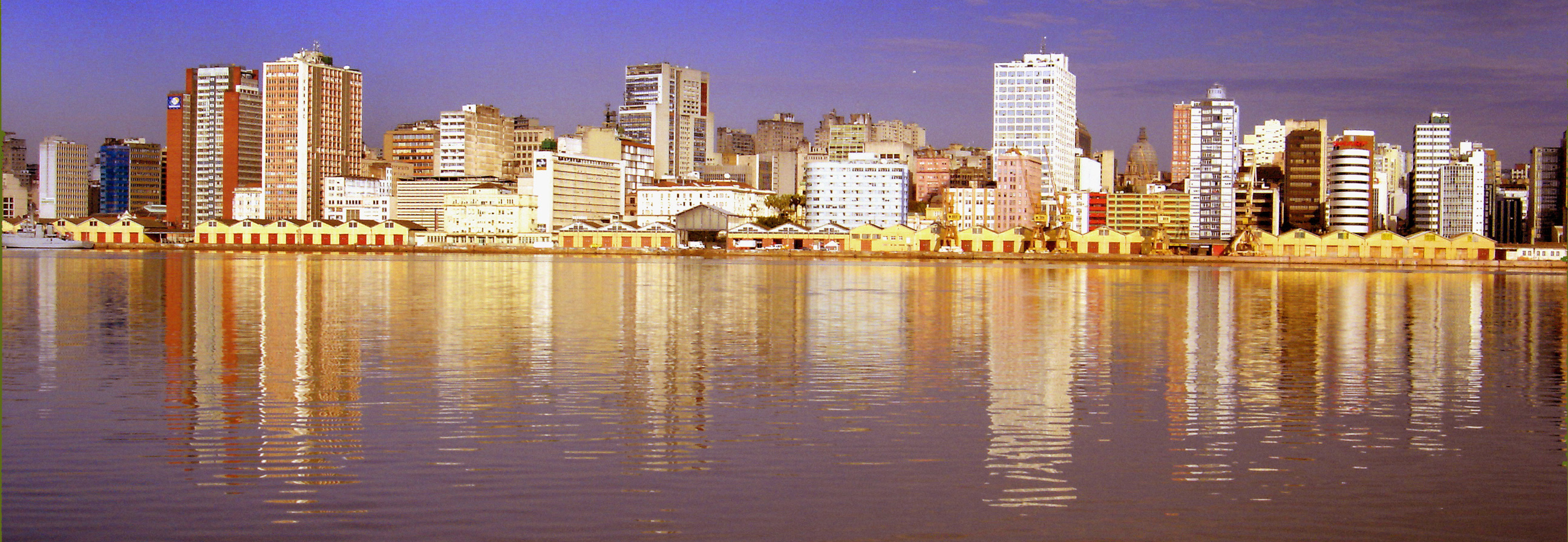 Panorâmica do Cais Mauá, parte do porto de Porto Alegre, Brasil.